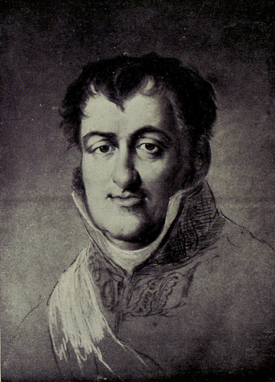 Ferran VII, pastel per Vicens Rodes.